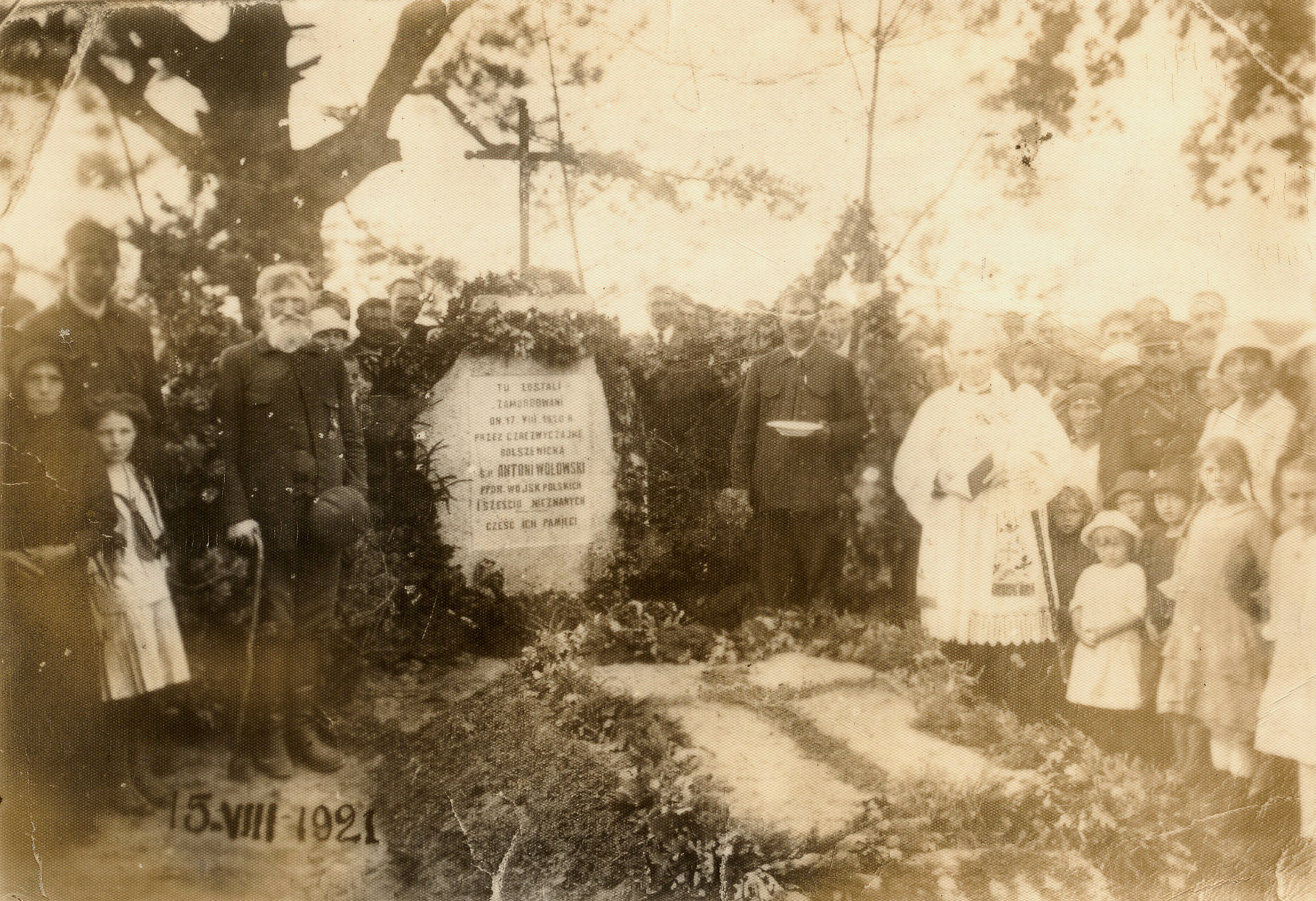 Zdjęcie księdza Władysława Turowskiego przedstawiające odsłonięcie pomnika pomordowanych w Rybienku Leśnym